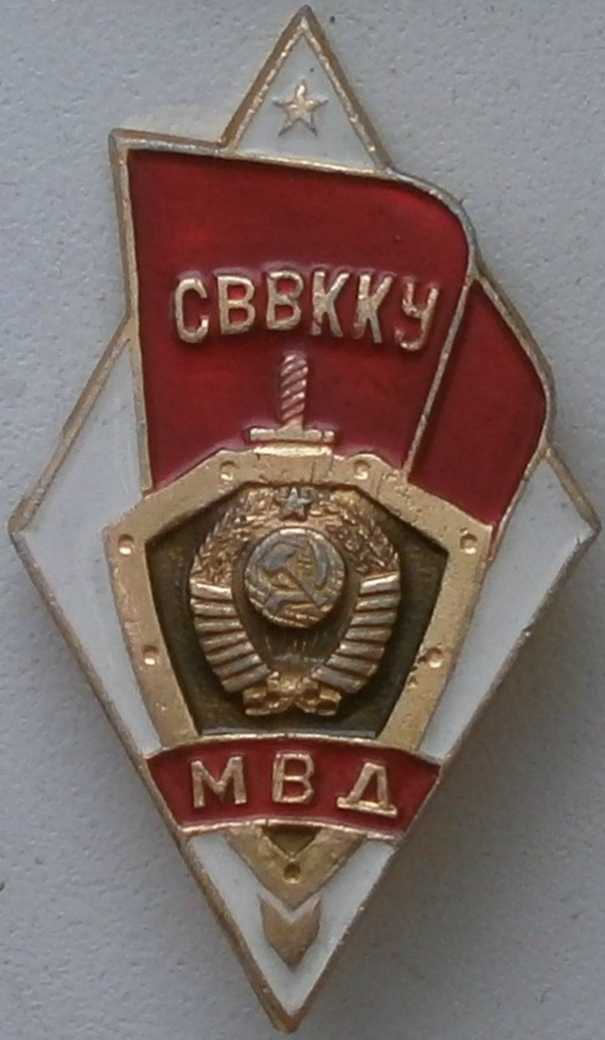 Ромб СВВККУ